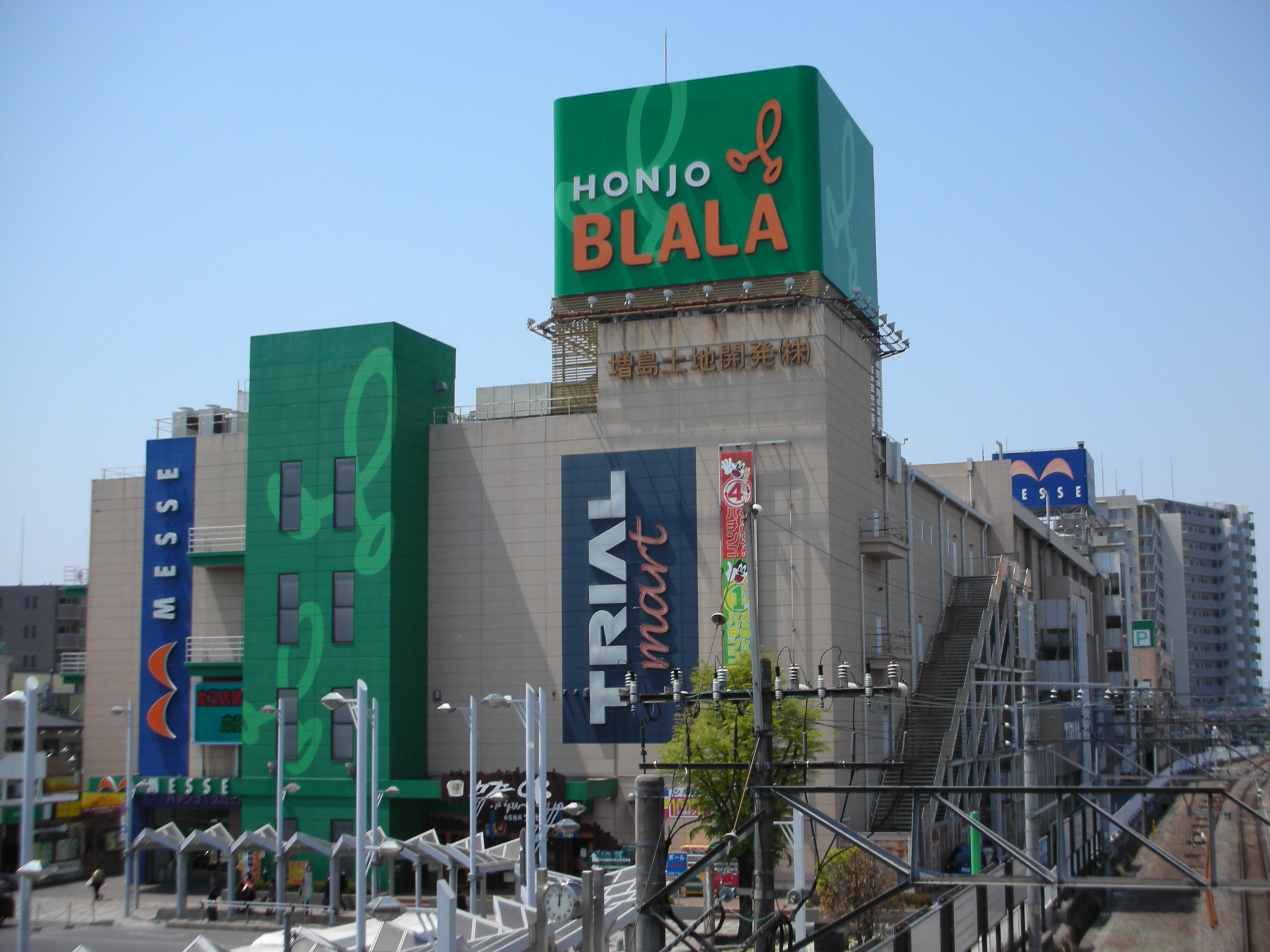 本庄BLALAの外観